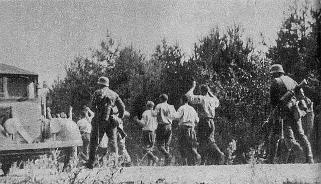 Mord na polskich jeńcach wojennych pod Ciepielowem $9-$7-1939. Jeńcy prowadzeni na egzekucję. Na odwrocie fotografii napis: "300 polskich żołnierzy, którzy w lesie pod Zwoleniem [Ciepielów] wstrzymali posuwanie się zmotoryzowanej jednostki piechoty [III./Inf.Rgt.15 (mot) 29.Inf.Div.], zostają odprowadzeni i niezwłocznie rozstrzelani".